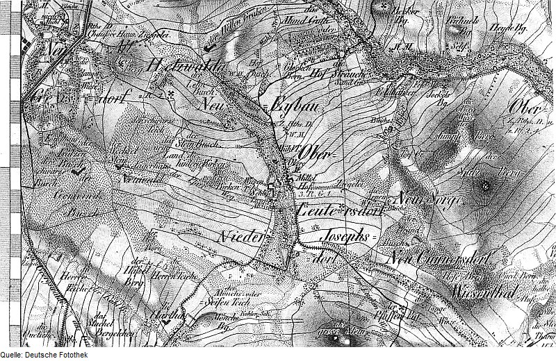 Original image description from the Deutsche Fotothek Eibau-Neueibau. Oberreit, Sect. Zittau, 1844/46